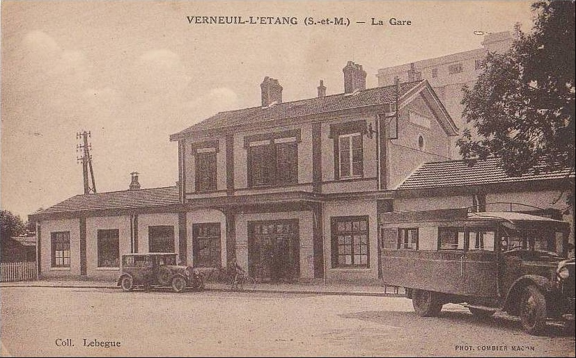 Gare de Verneuil-l'étang au début du XXème siècle avec un bus en premier plan.